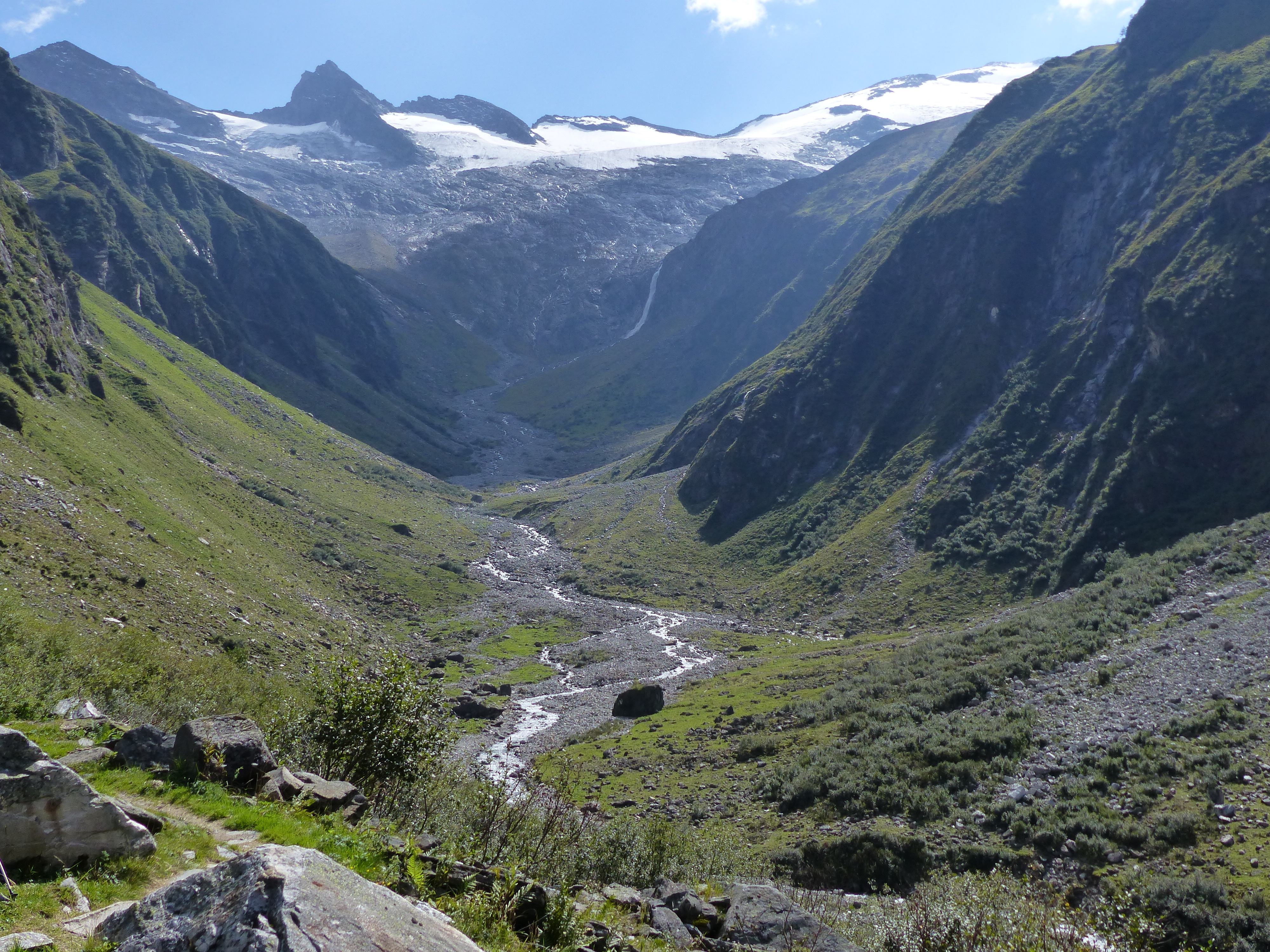 Talschluss des Habachtals mit Kratzenberg (ganz links) und Schwarzkopf (zweiter Gipfel von links)